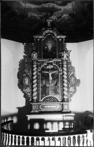 Altaruppsats från 1700-talet. Efter behandlingen år 1955. Kategori: (05) Altare med altarringarAltaruppsats från 1700-talet. Efter behandlingen år 1955.